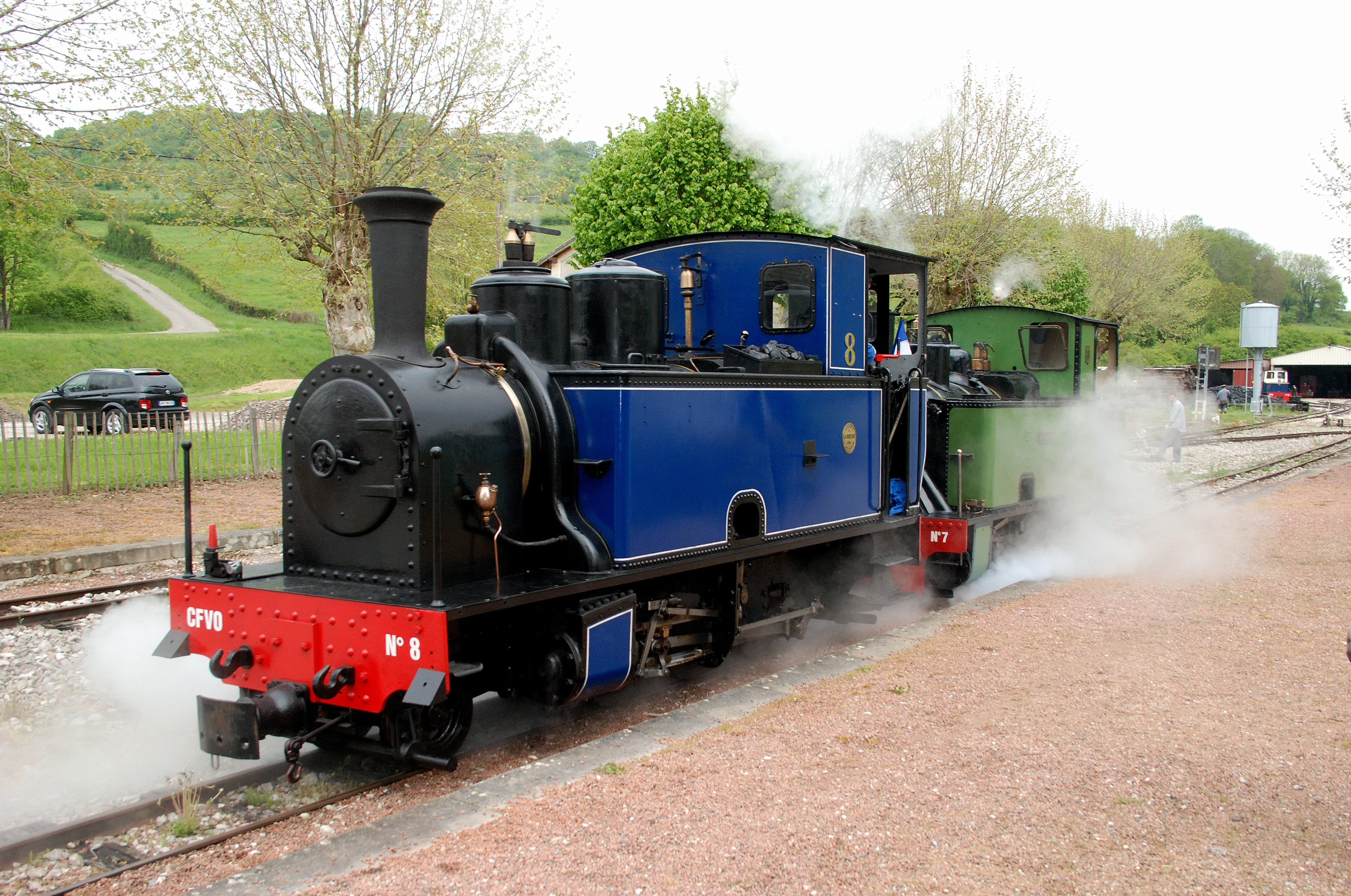 Chemin de fer touristique de la vallée de l'Ouche à Bligny-sur-Ouche (Côte-d'Or, France).